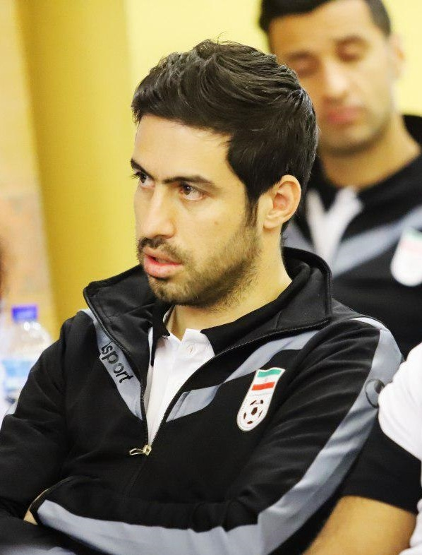 تصاویر مرحله دوم کلاس مربیگری B آسیا در تهران به مدرسی امیر حسین پیروانی با حضور ستارگان سابق فوتبال مثل تیموریان، جباری، حیدری،‌عمران‌زاده، بیک‌زاده و بنگر